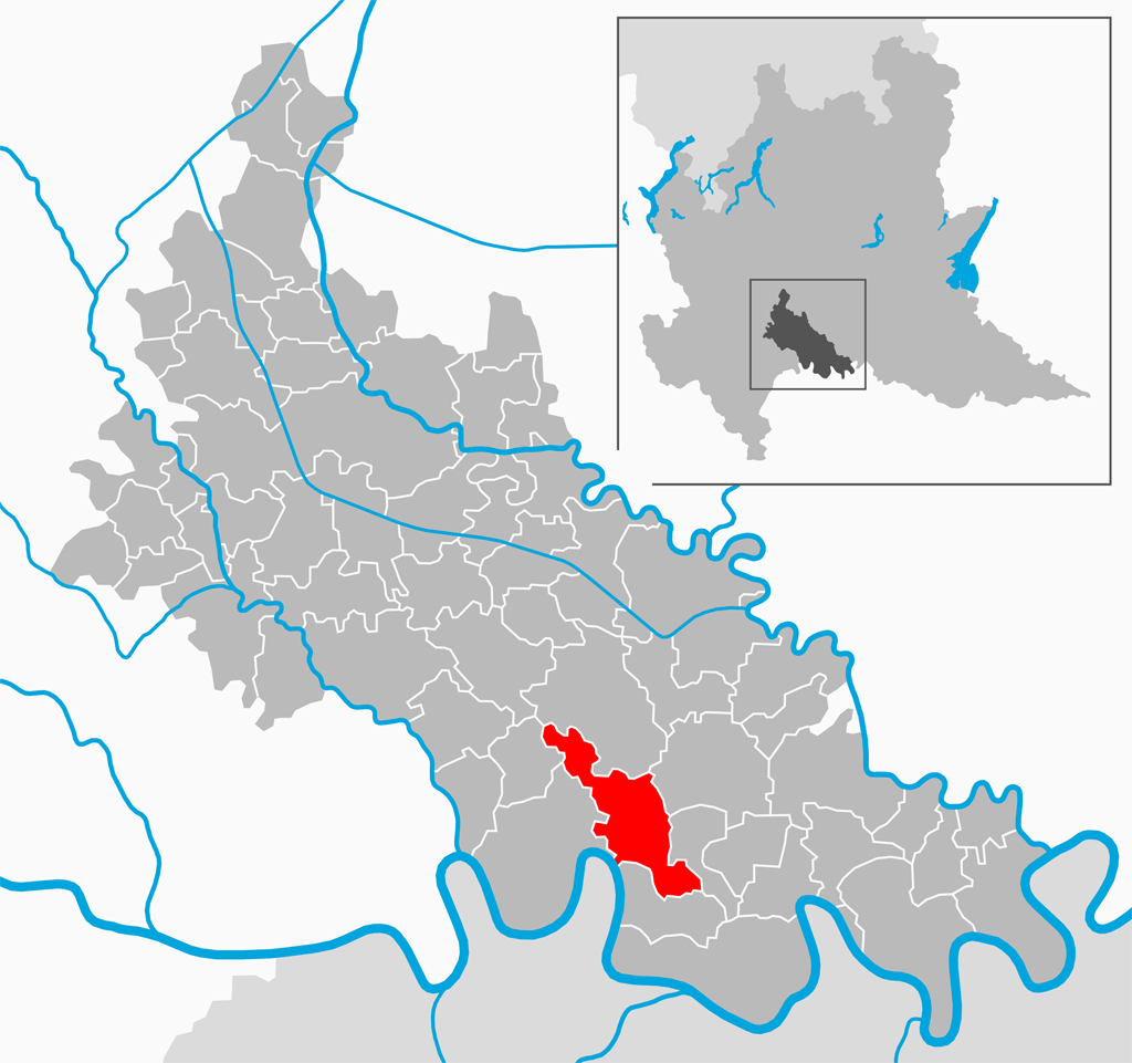 Il comune di Somaglia nella provincia di Lodi